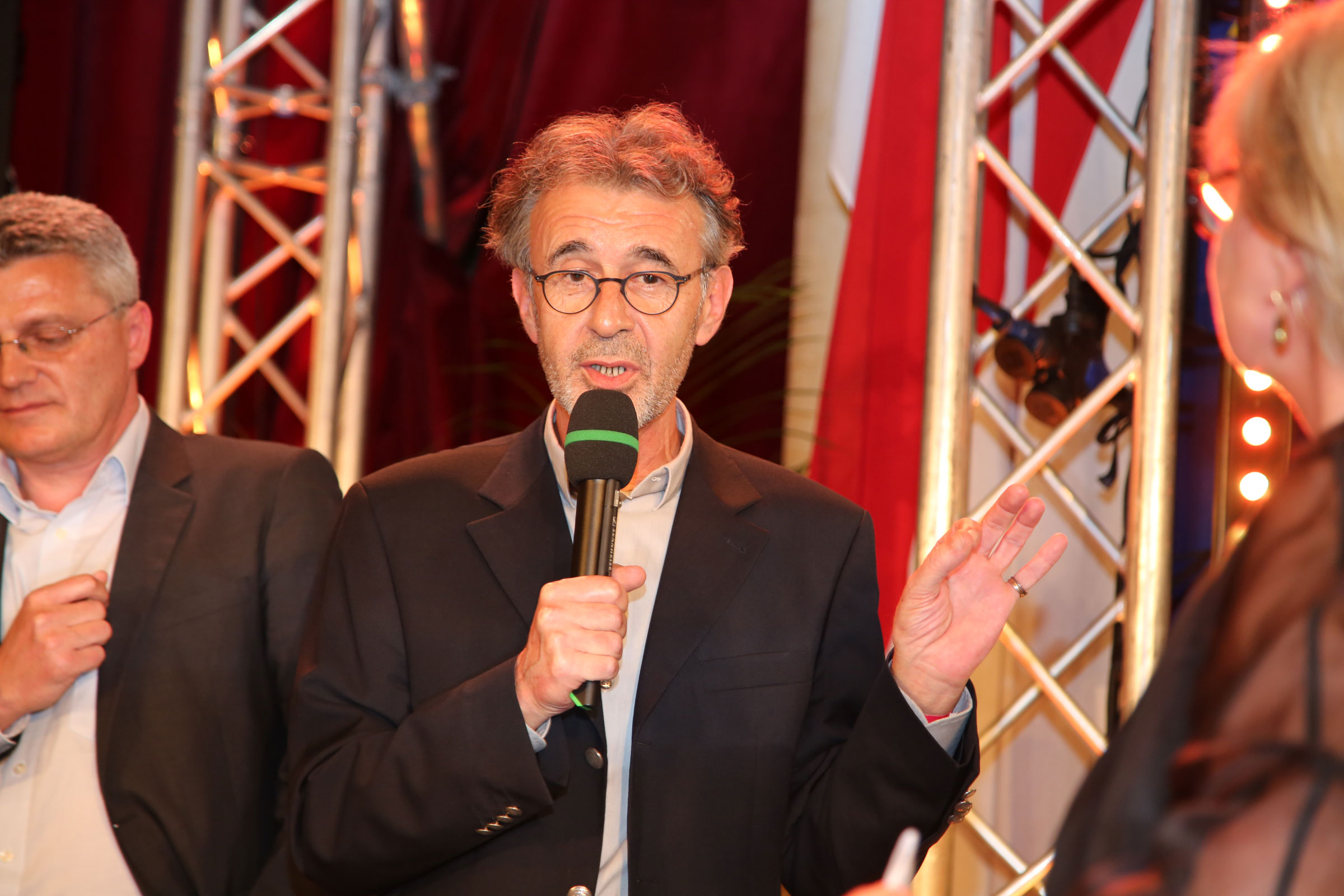 Peter Klein (Radiojournalist, Ö1) bei der Verleihung des 1. Österreichischen Radiopreises 2015